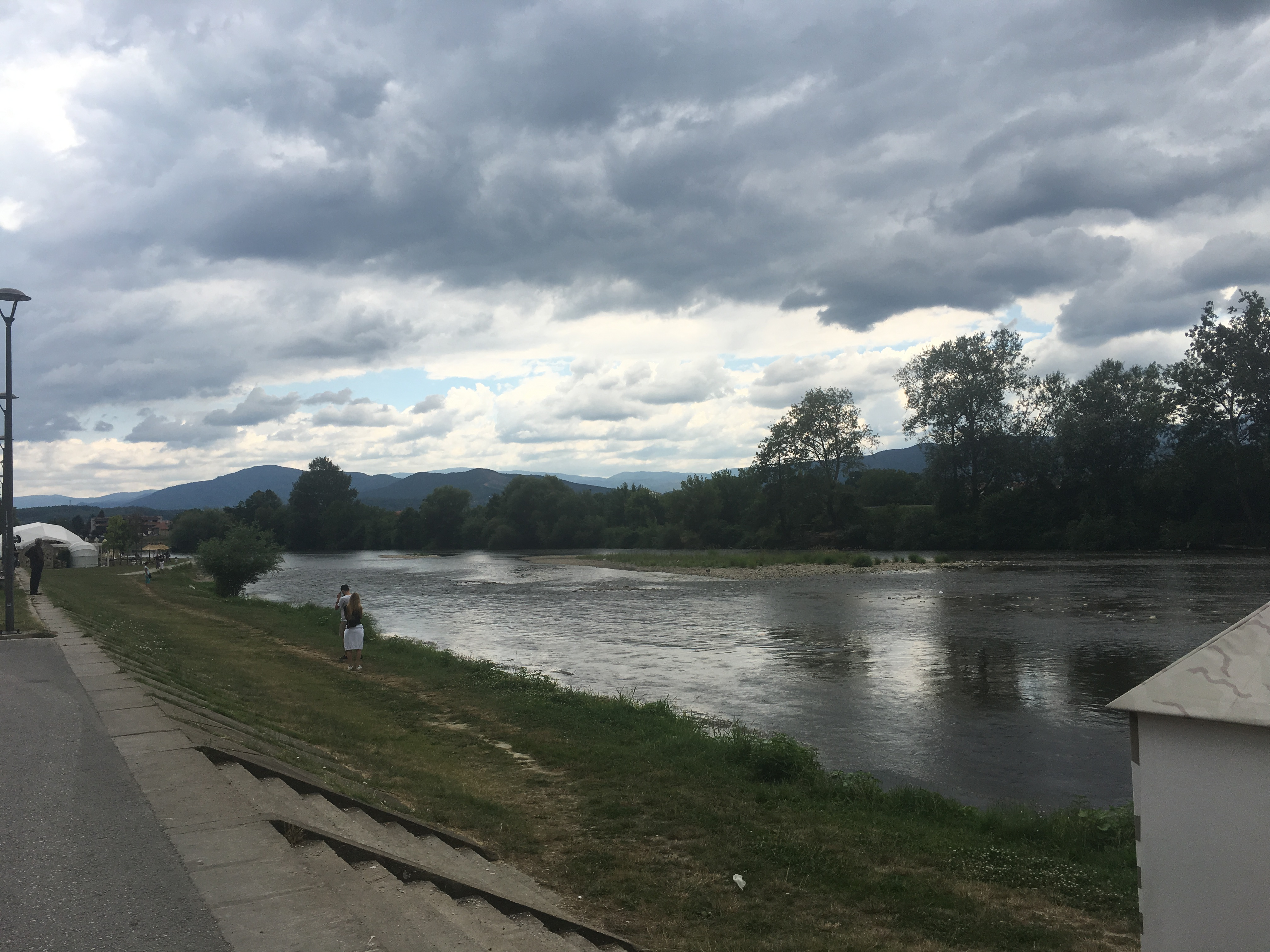 Reka Ibar, foto-tura na Edu Viki kampu 2017.